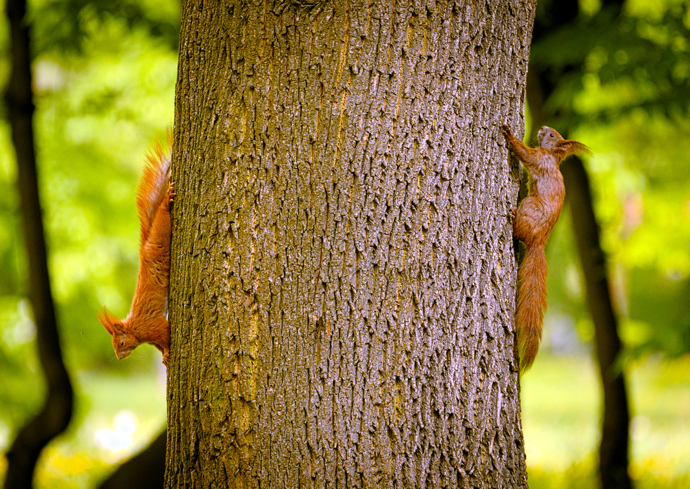 Two squirrels (Sciurus vulgaris) on a tree. Chasing each other they usually ended being on opposite side of the trunk. Dwie wiewiórki (Sciurus vulgaris) na drzewie. W efekcie wzajemnej pogoni zazwyczaj znajdowały się po przeciwnych stronach pnia.